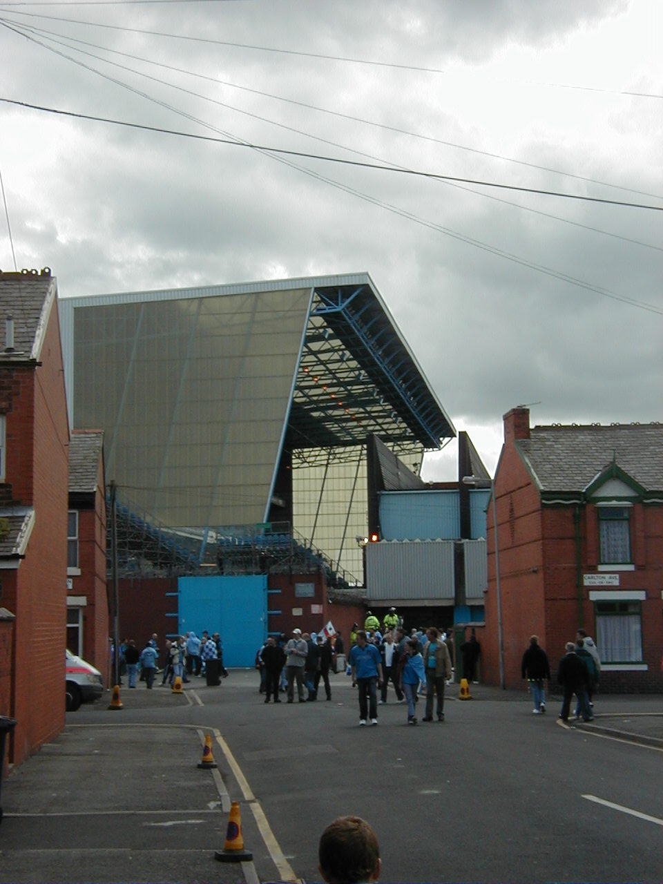 PIC00002